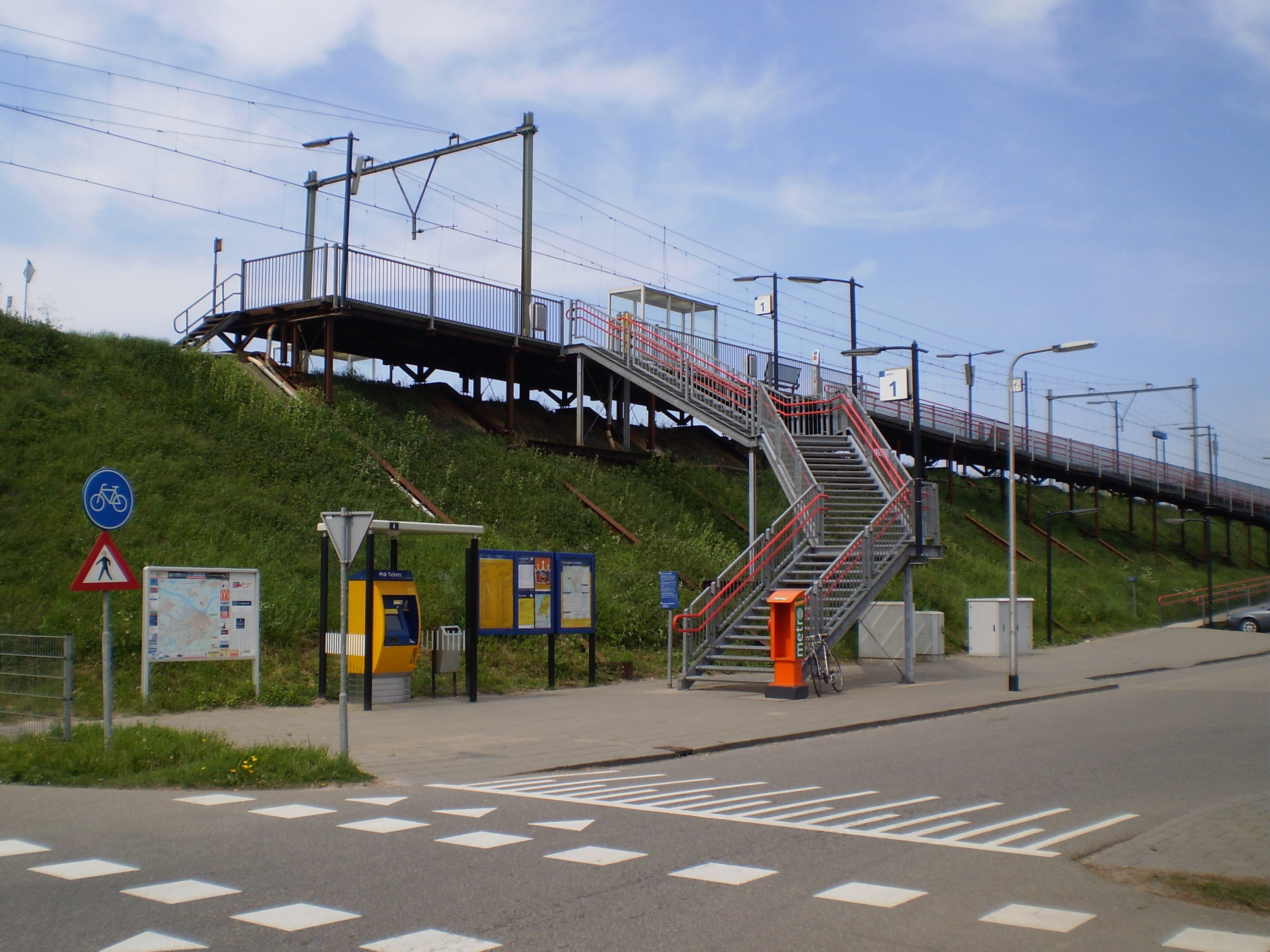 Station Nijmegen Lent, het oude station in 2009. In 2013 is een nieuw station gebouwd.